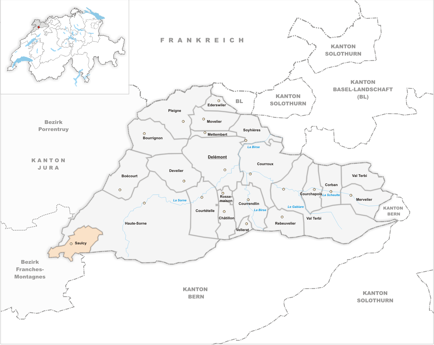 Municipality Saulcy